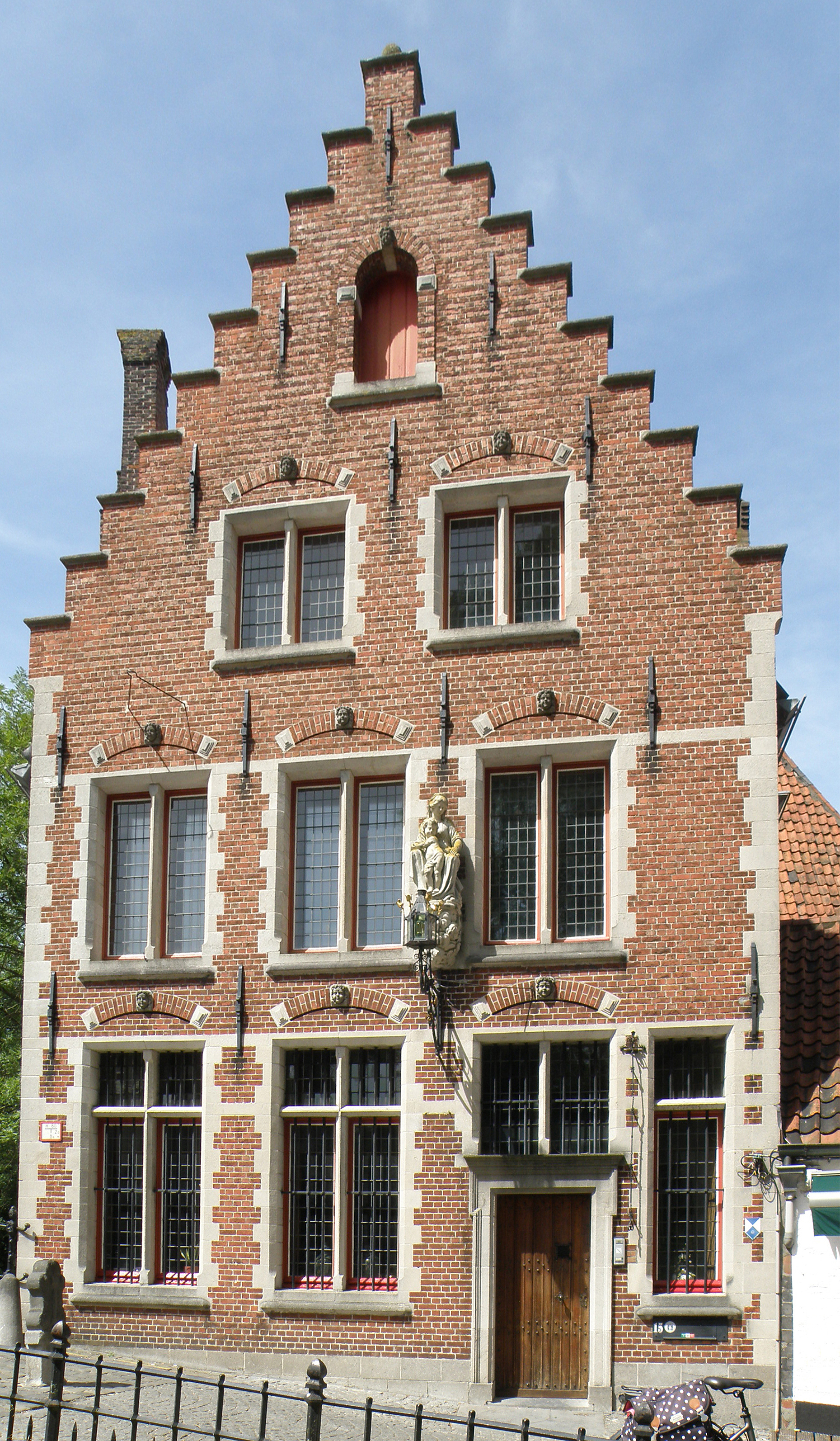 Brugge, Begijnhof. Pastorie van de begijnhofparochie, Wijngaardplein nr. 15.